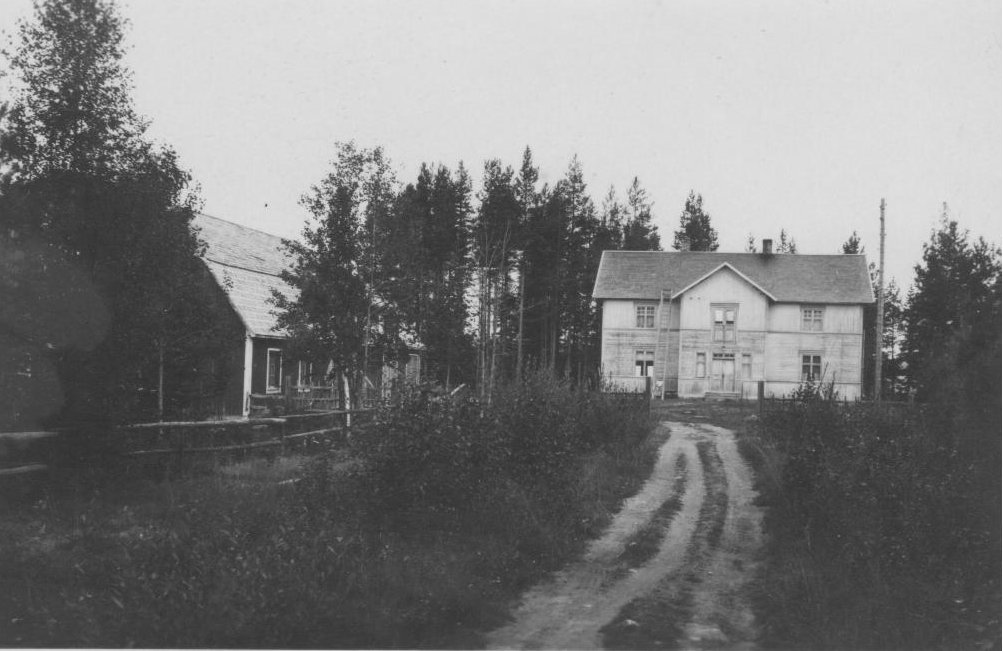 Bäcklund